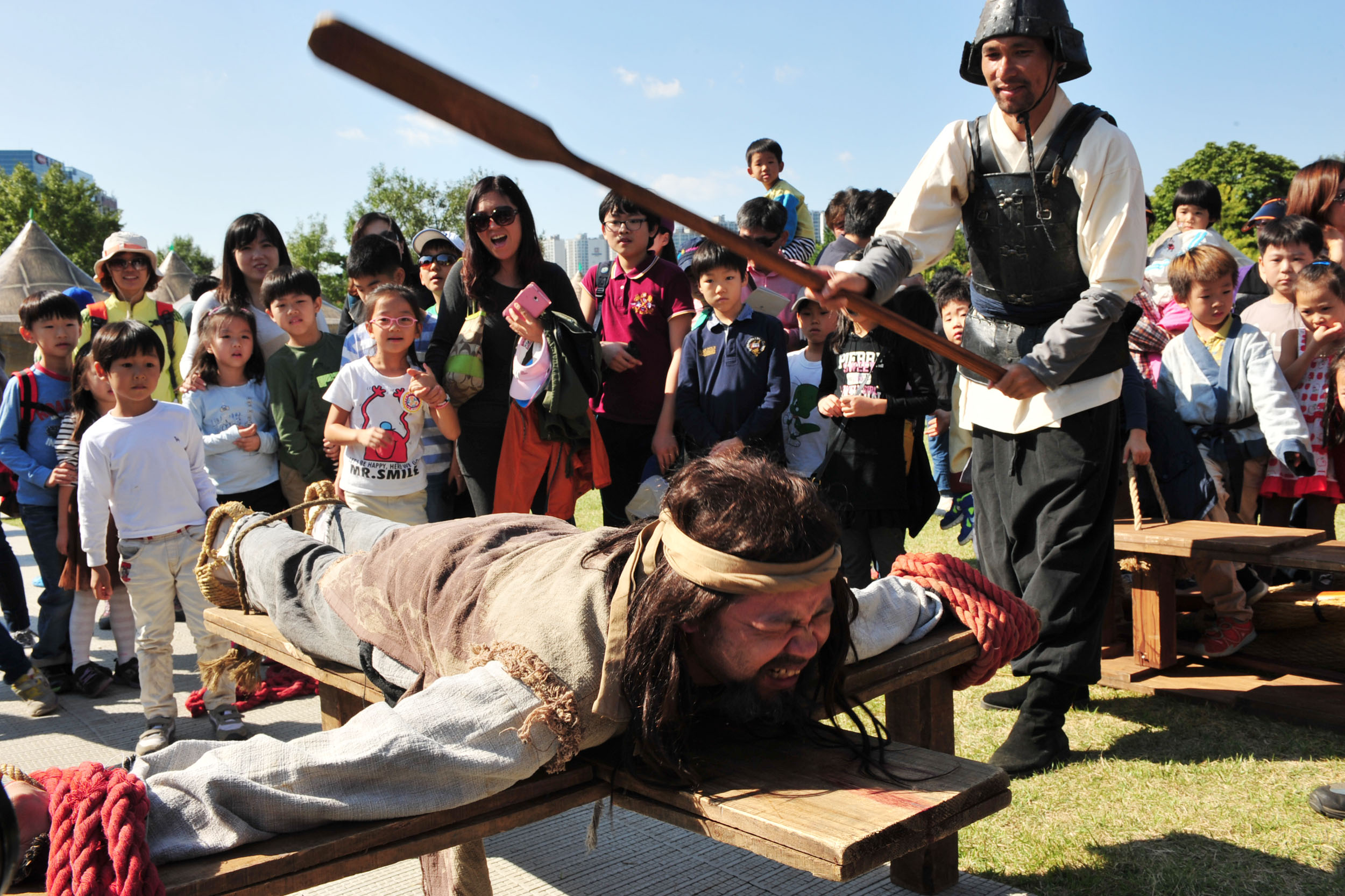 제13회 한성백제문화제 백제병영체험